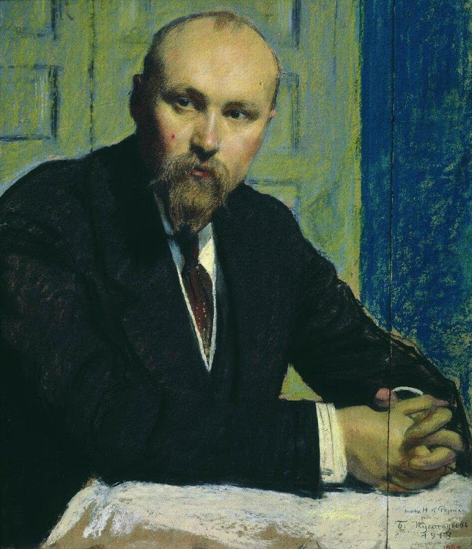 Б.М.Кустодиев «Портрет Н.К.Рериха» 1913